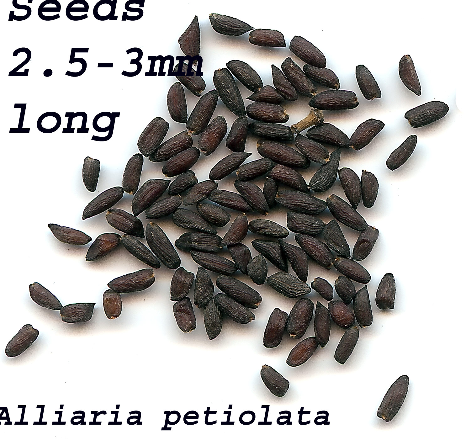 Alliaria petiolata seeds